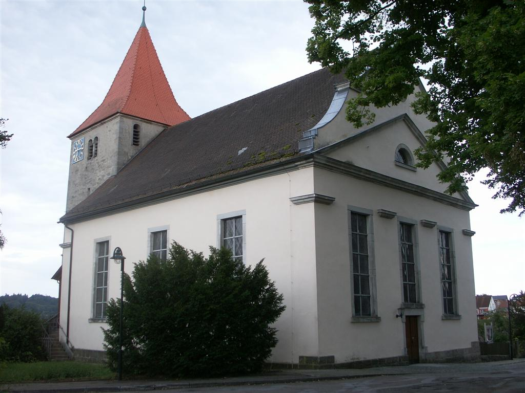 Protestantische Kirche Adelmannsfelden. Evangelische Kirche Adelmannsfelden.